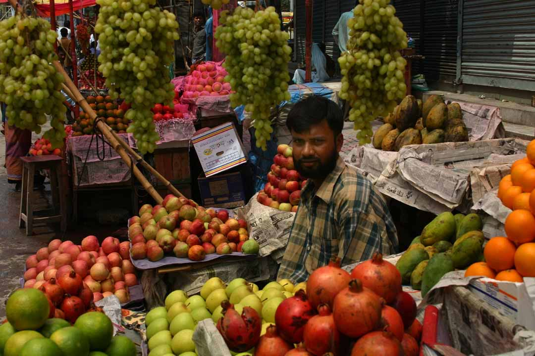 Dhaka fruitseller.